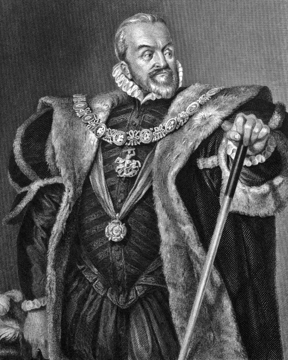 Burleigh aus Friedrich Schillers Drama Maria Stuart, als Stahlstich gestochen um 1859 nach einer Zeichnung von Arthur von Ramberg